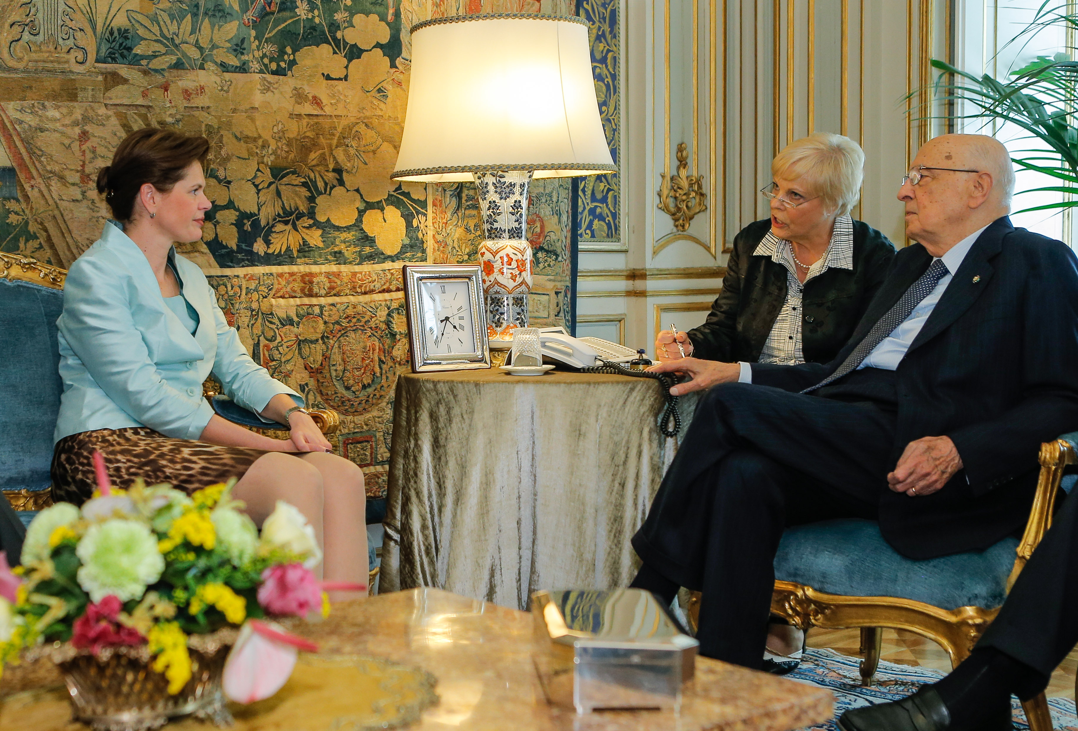 Srečanje premierke Alenke Bratušek z italijanskim predsednikom Giorgiem Napolitanom